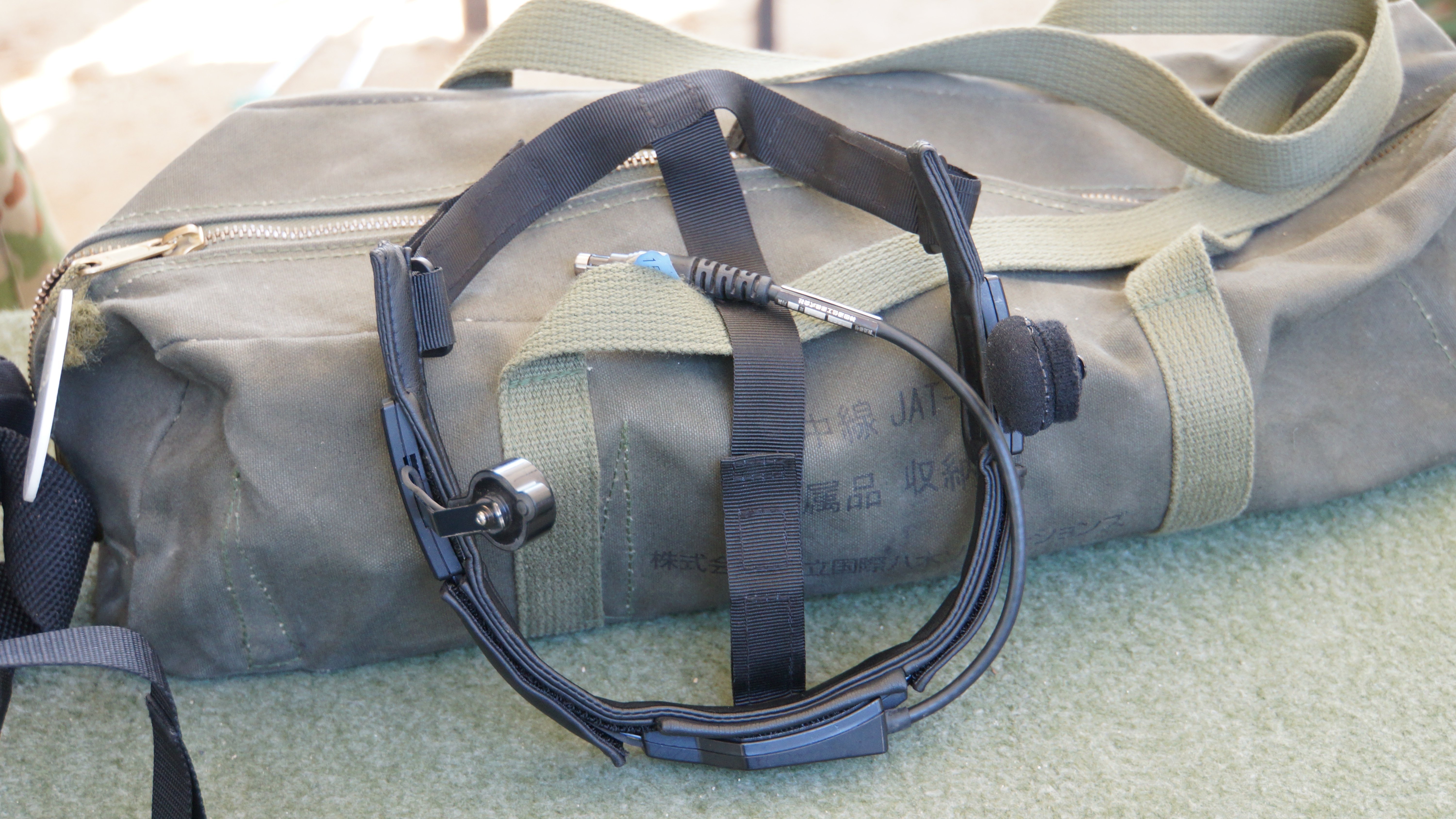 陸上自衛隊 広域多目的無線機携帯Ⅰ型（JPRC-Z100） 骨伝導スピーカ。 2015年9月13日 伊丹駐屯地にて。